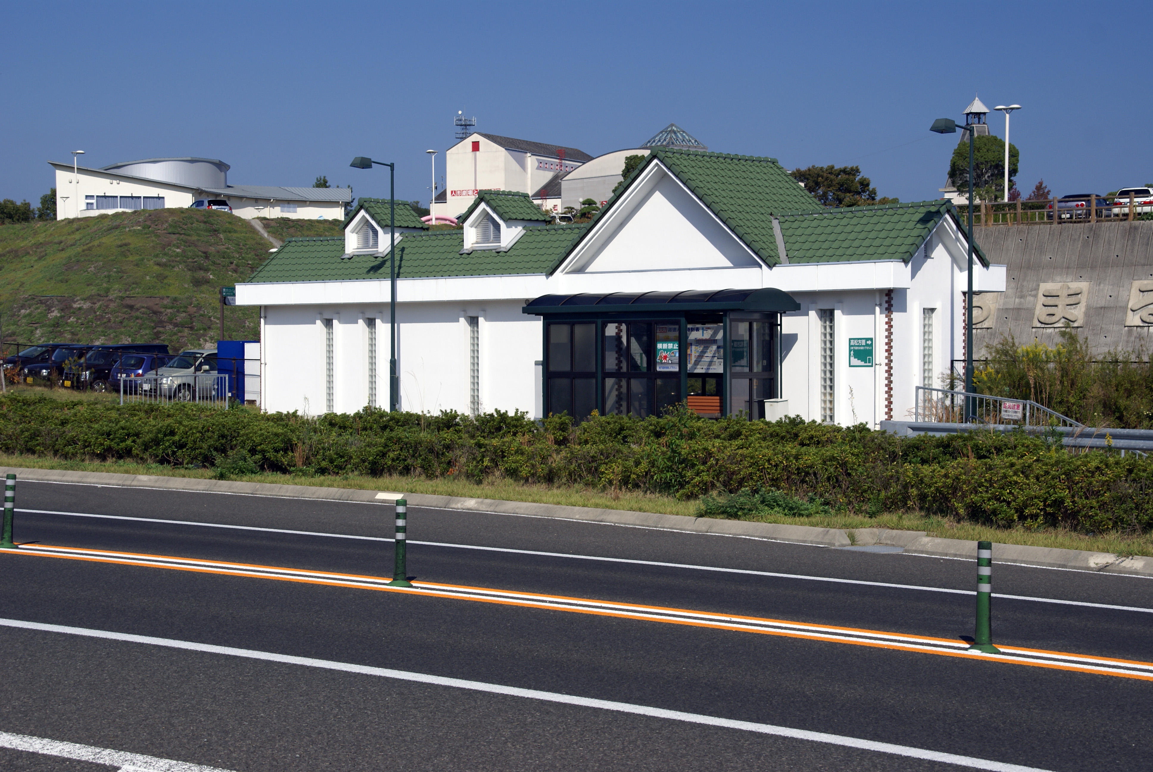 Takamatsu Expressway Ochi bus stop in Higashikagawa, Kagawa prefecture, Japan